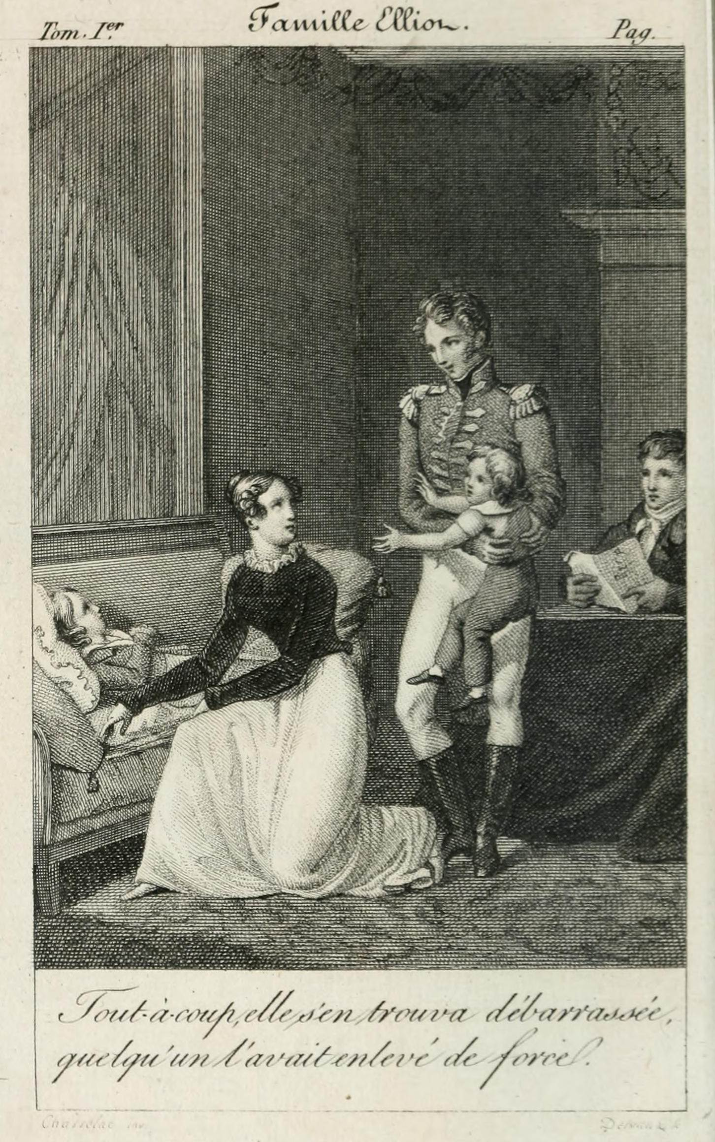 Frontispice du livre : La Famille Elliot de Jane Austen 1821 - Paris - Arthus Bertrand